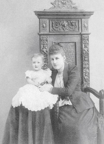 Princesa Alexandra da Grécia com a sua primeira filha, a Grã-duquesa Maria Pavlovna da Rússia